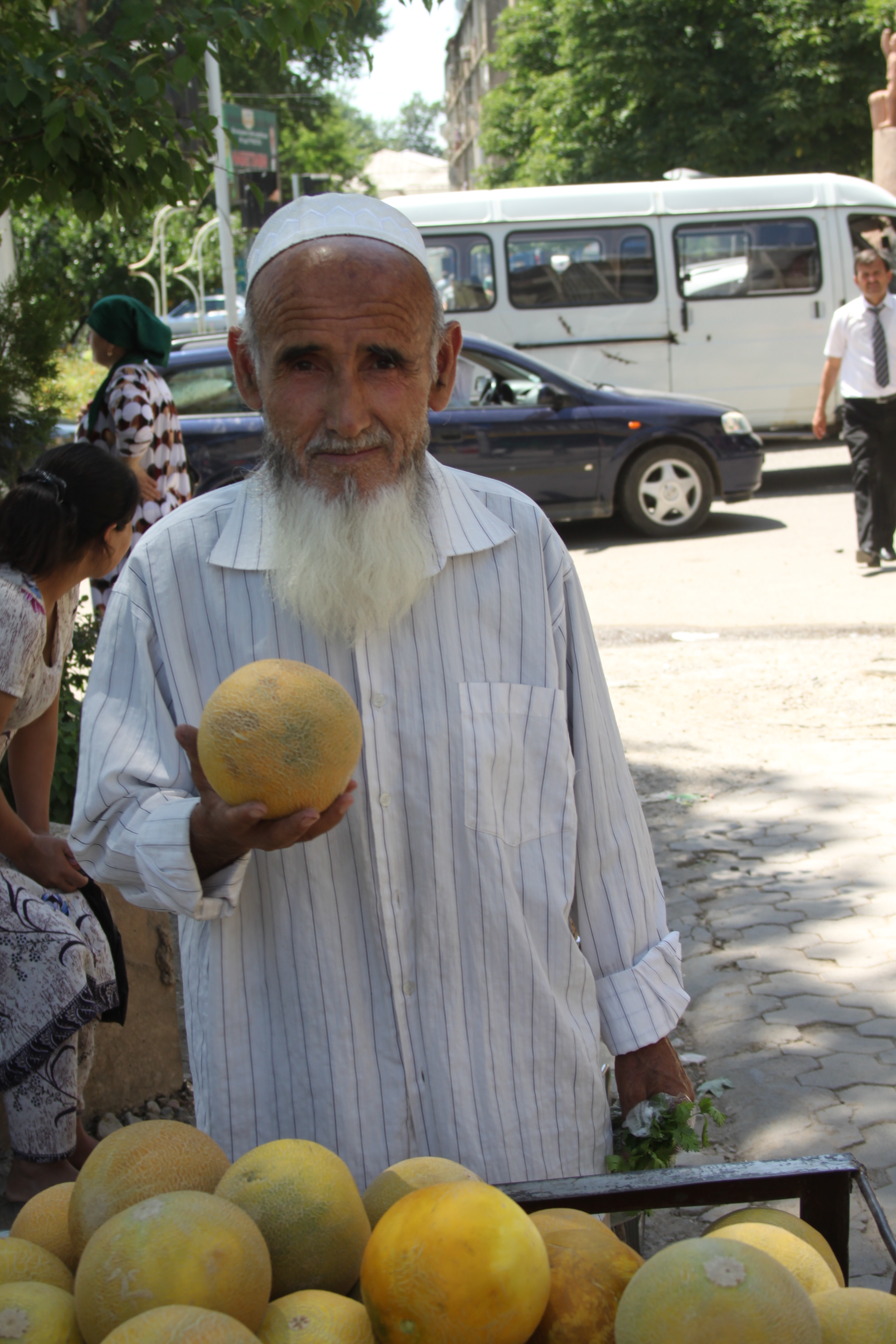 Dushanbe aksakal 043